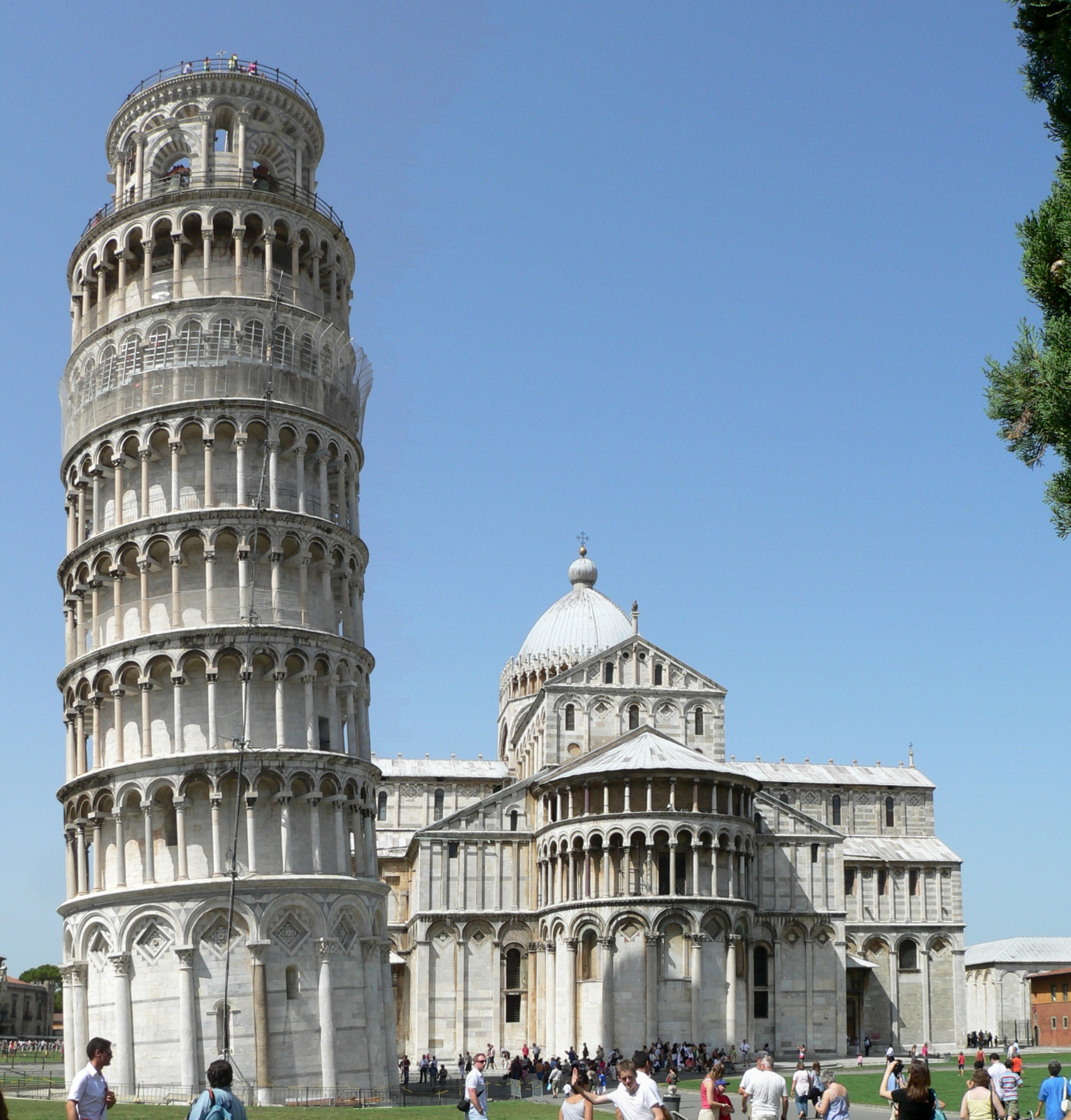 Пизанская башня.